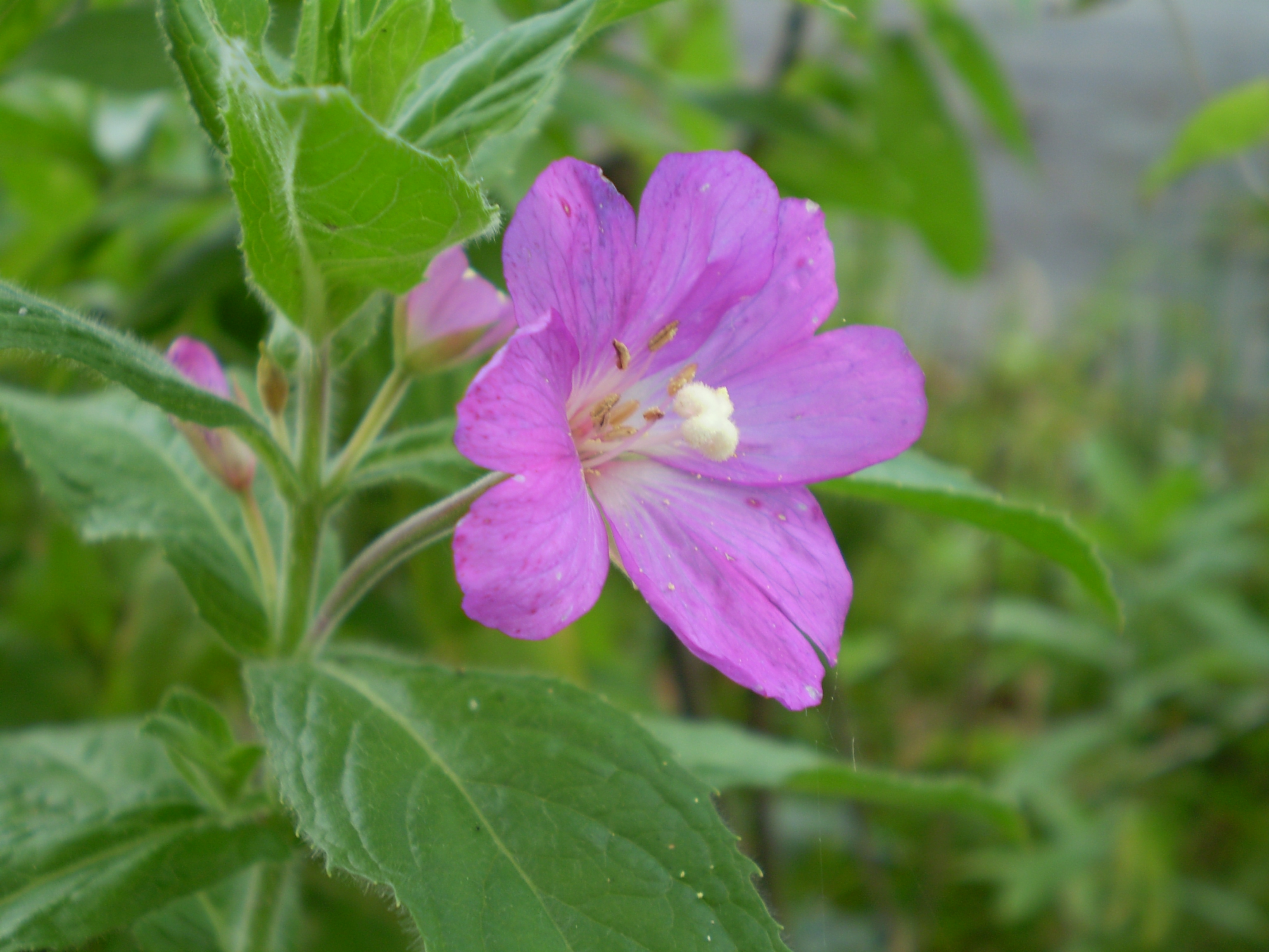 Epilobium parviflorum viltige basterdwederik